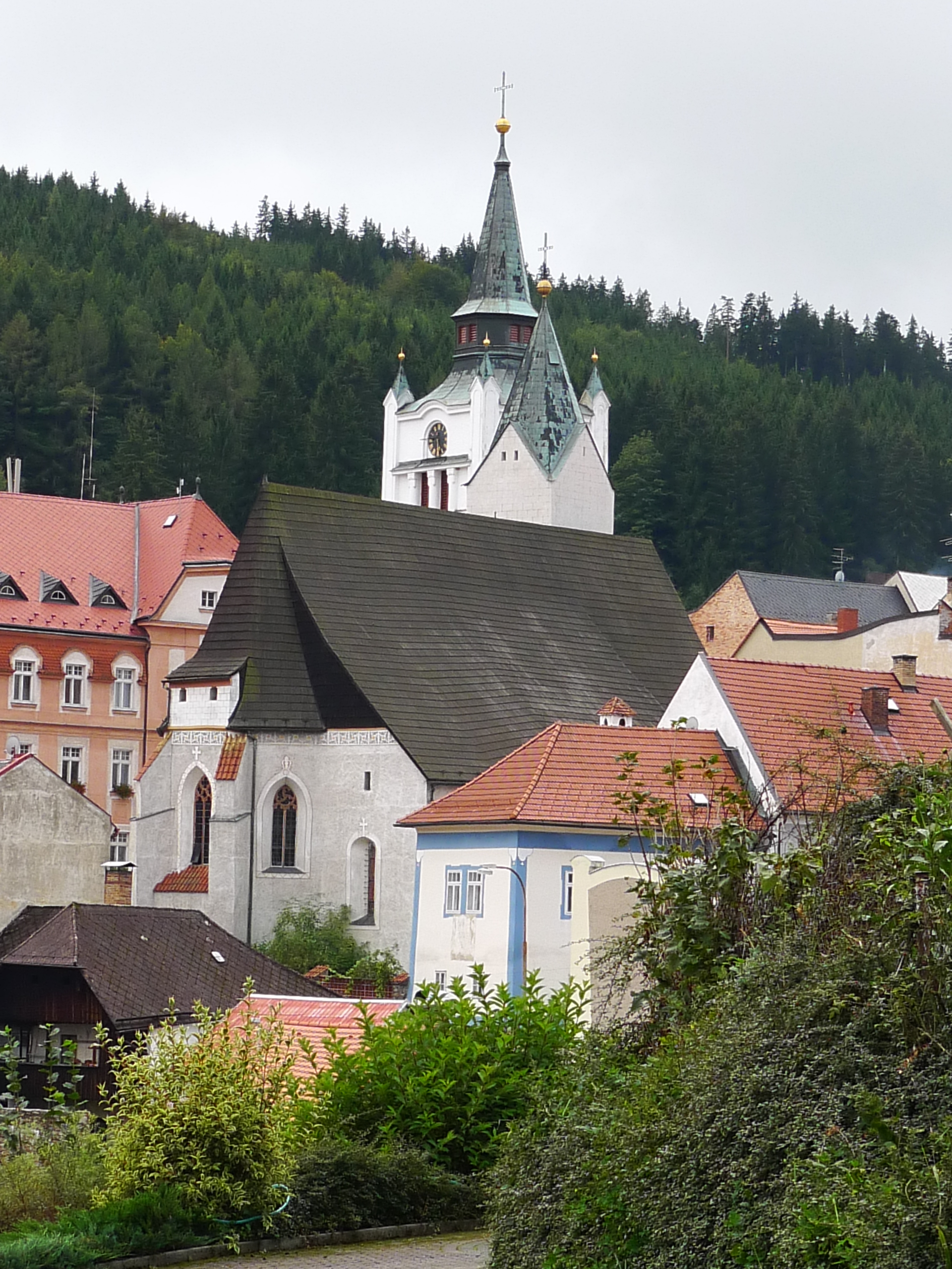 Kostel Navštívení Panny Marie, nám. Svobody, Vimperk, Vimperk.